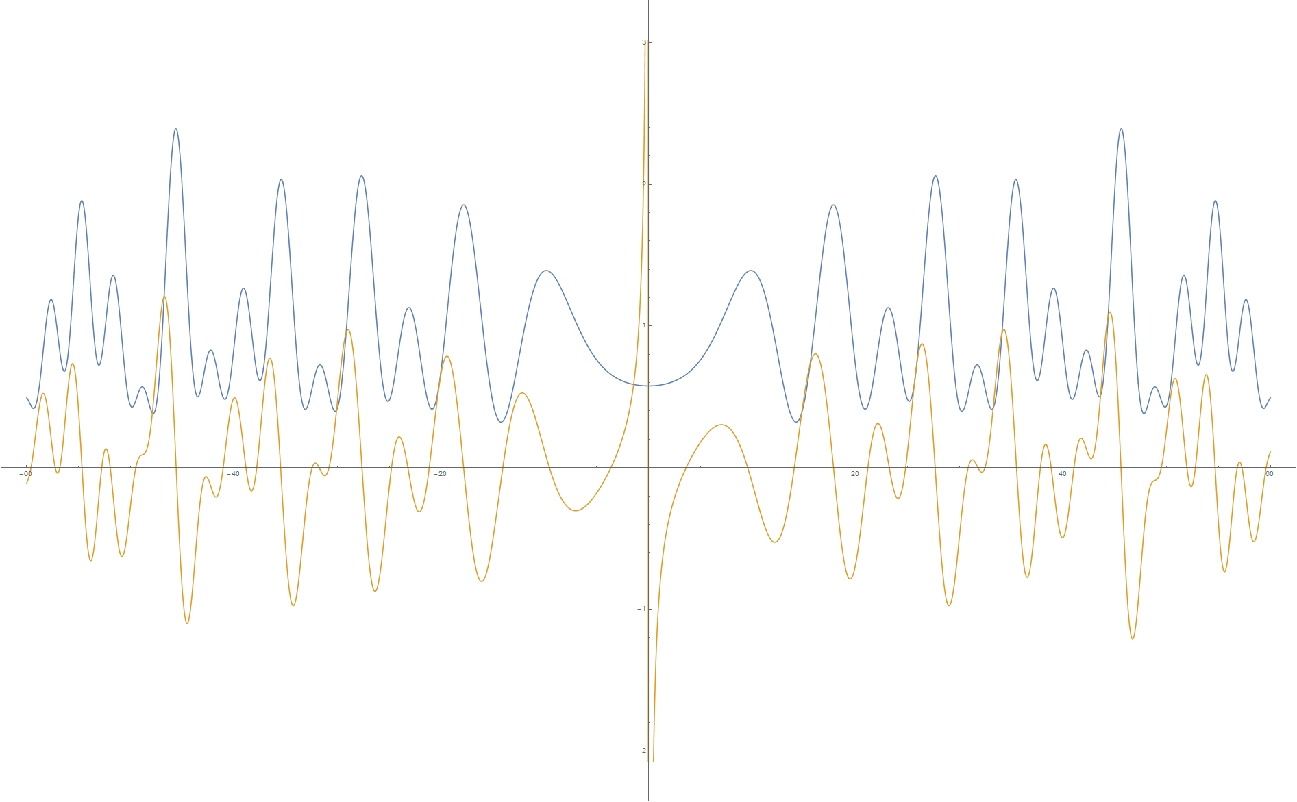 ζ(1+it)的图象